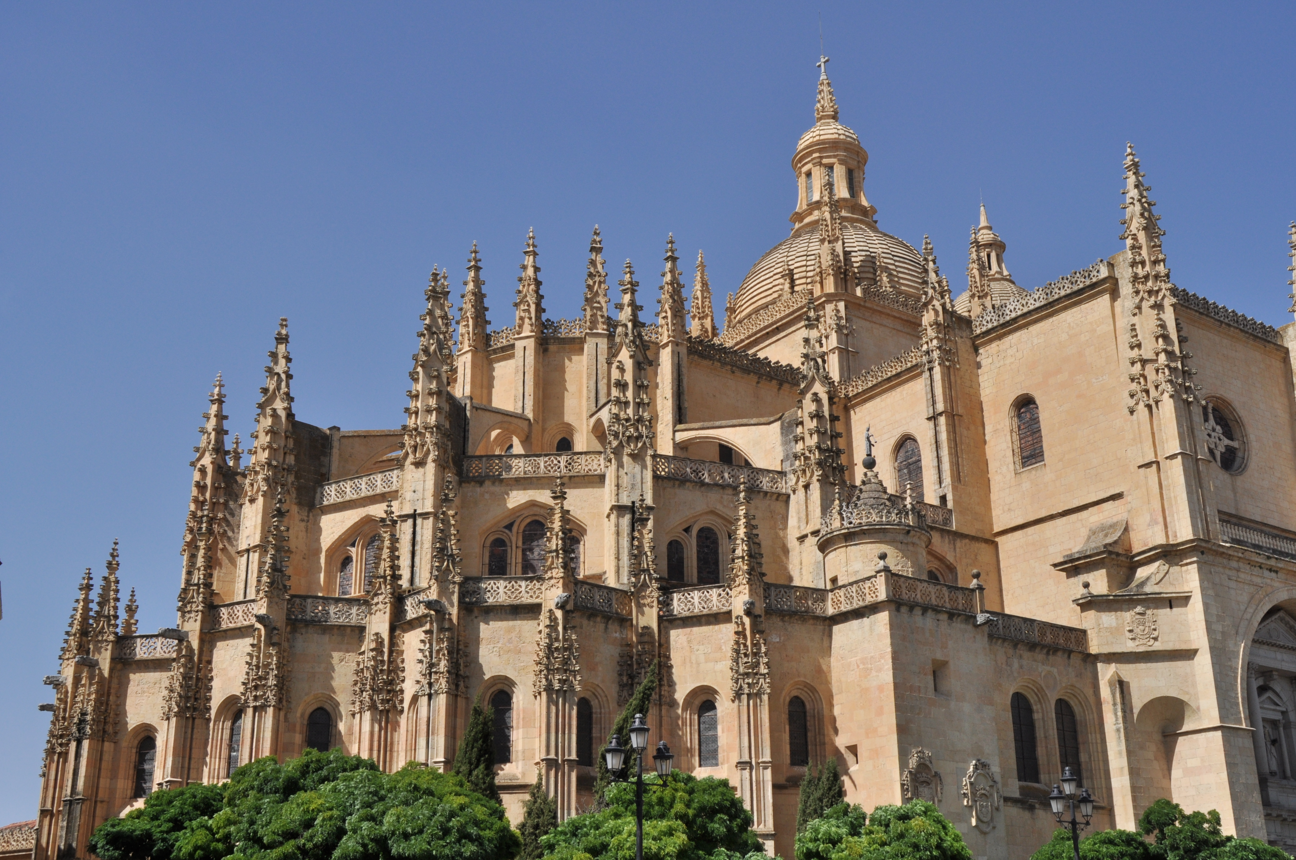 Segovia Capital - 143